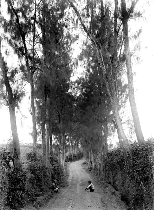 Repronegatief. Tjemaralaantje op de weg naar Selo,Midden-Java